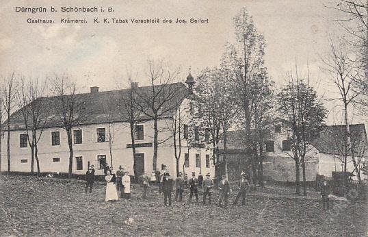 Gasthaus in Dürngrün, später Vyspá, heute abgesiedelte Katastralgemeinde der Stadt Luby, Tschechien